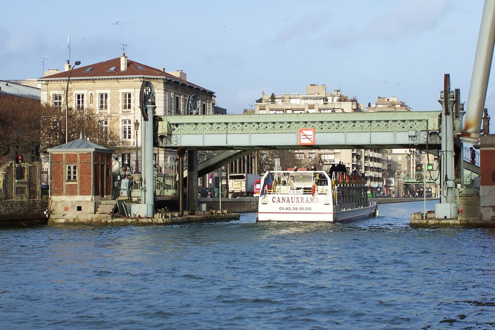 Dernier pont-levant de Paris : pont de la rue de Crimée.